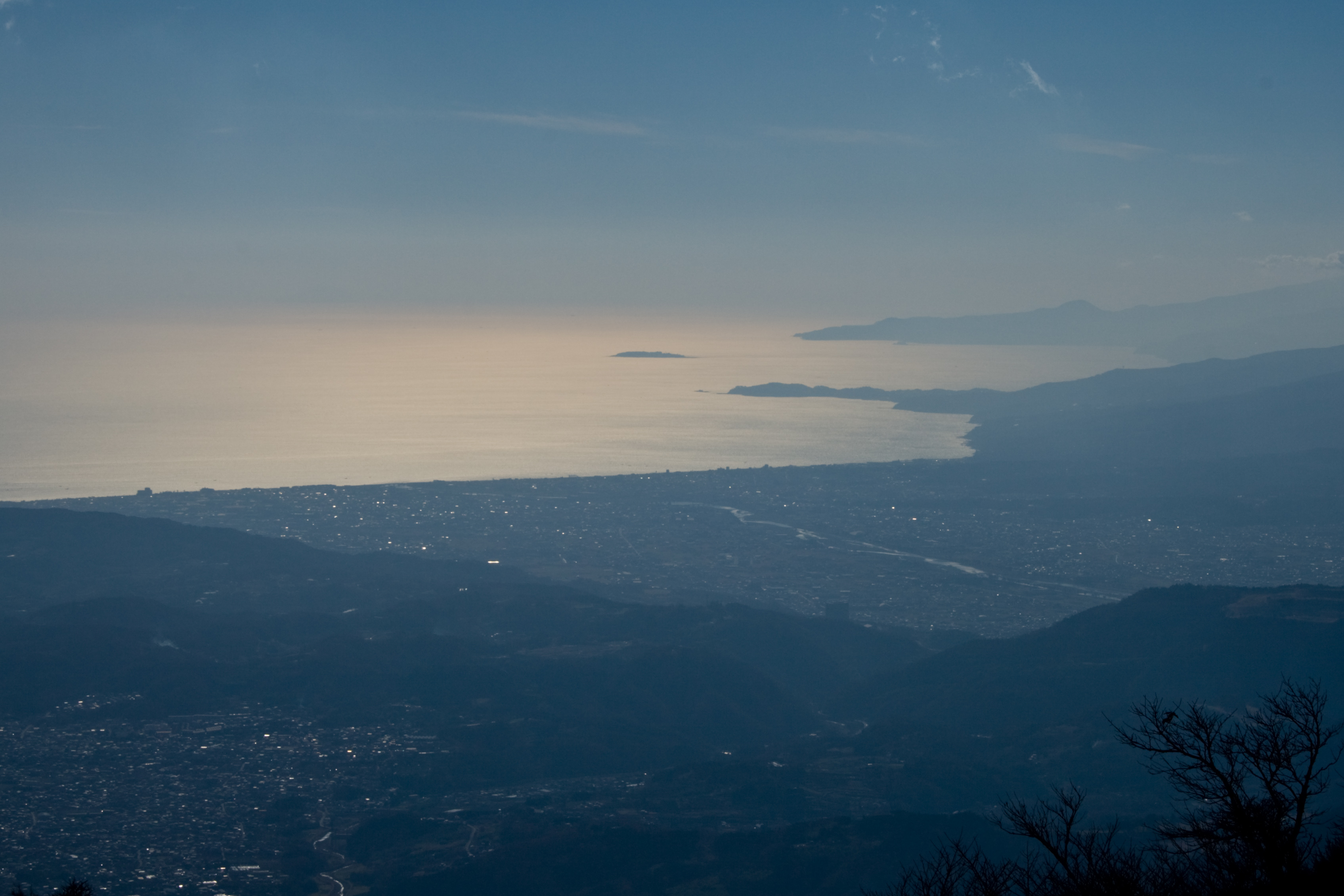 丹沢山地より望む真鶴半島